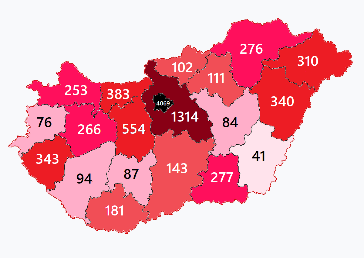 Mapa celkových případů covidu-19 v Maďarsku